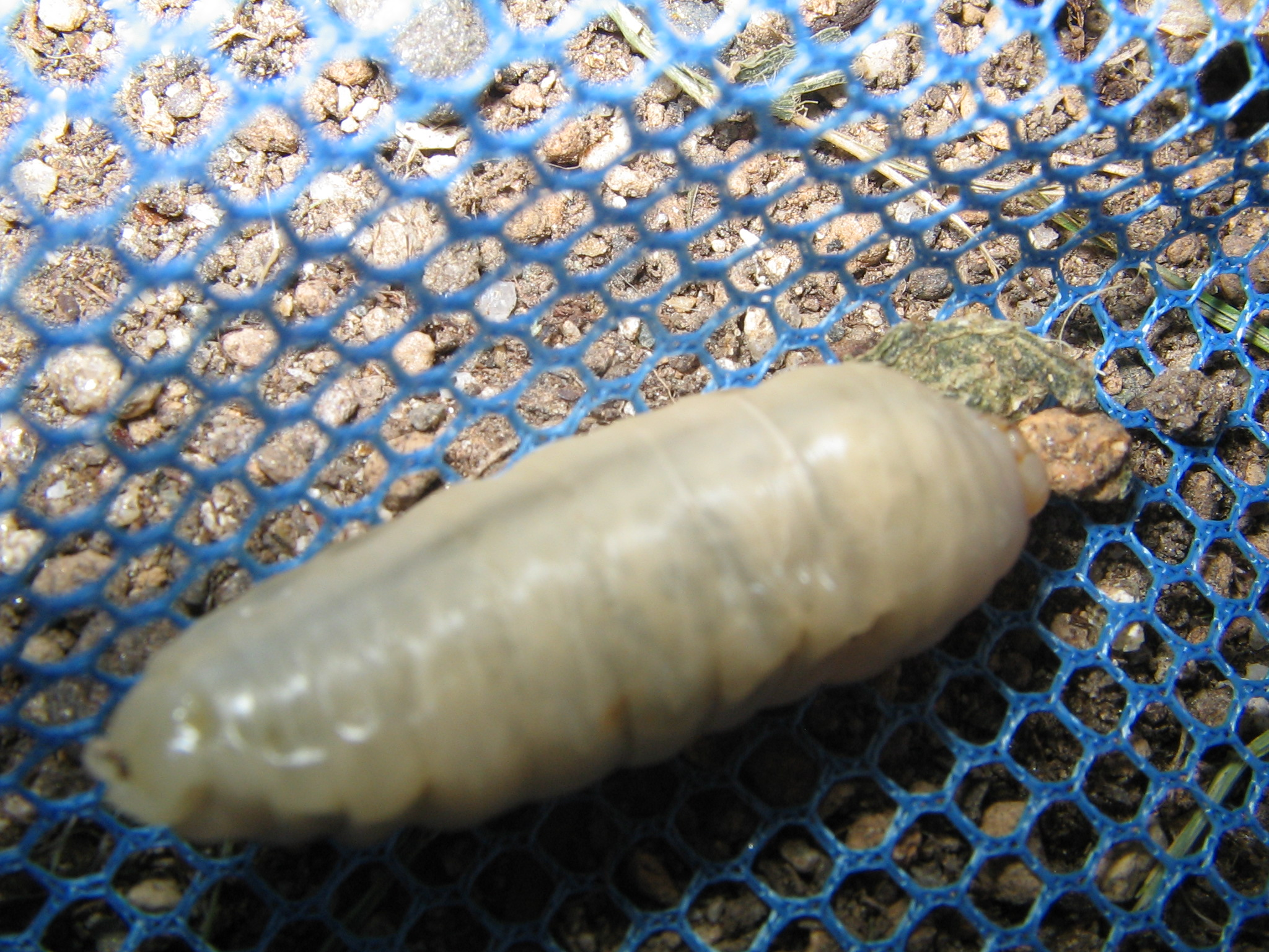 （ハチノコ） [1]